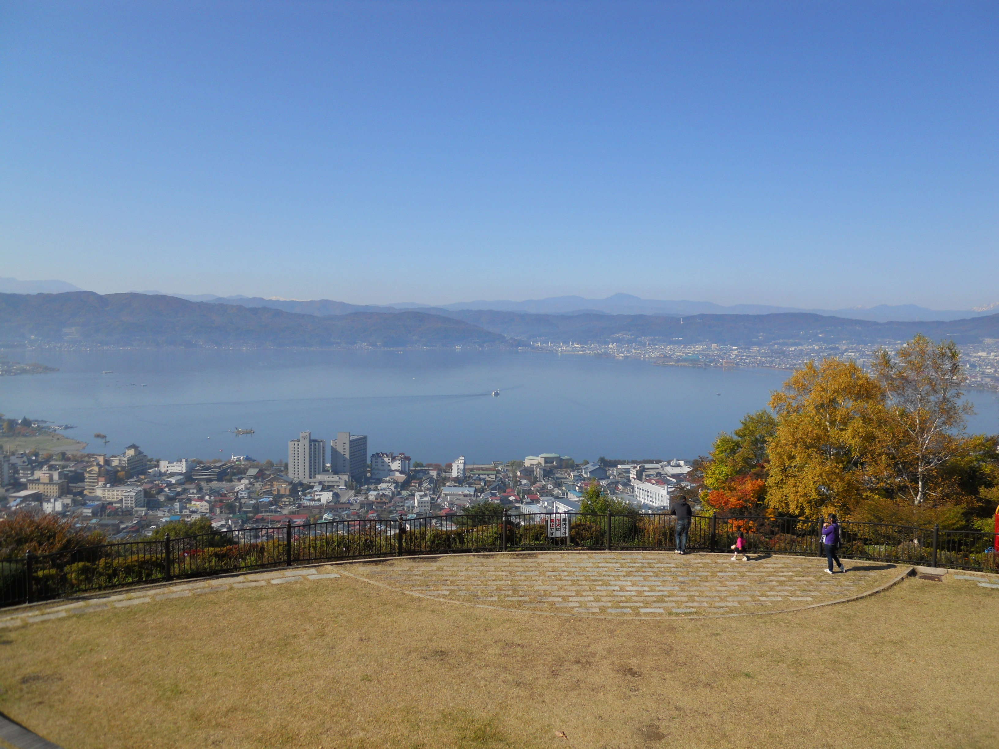 立石公園からの諏訪湖